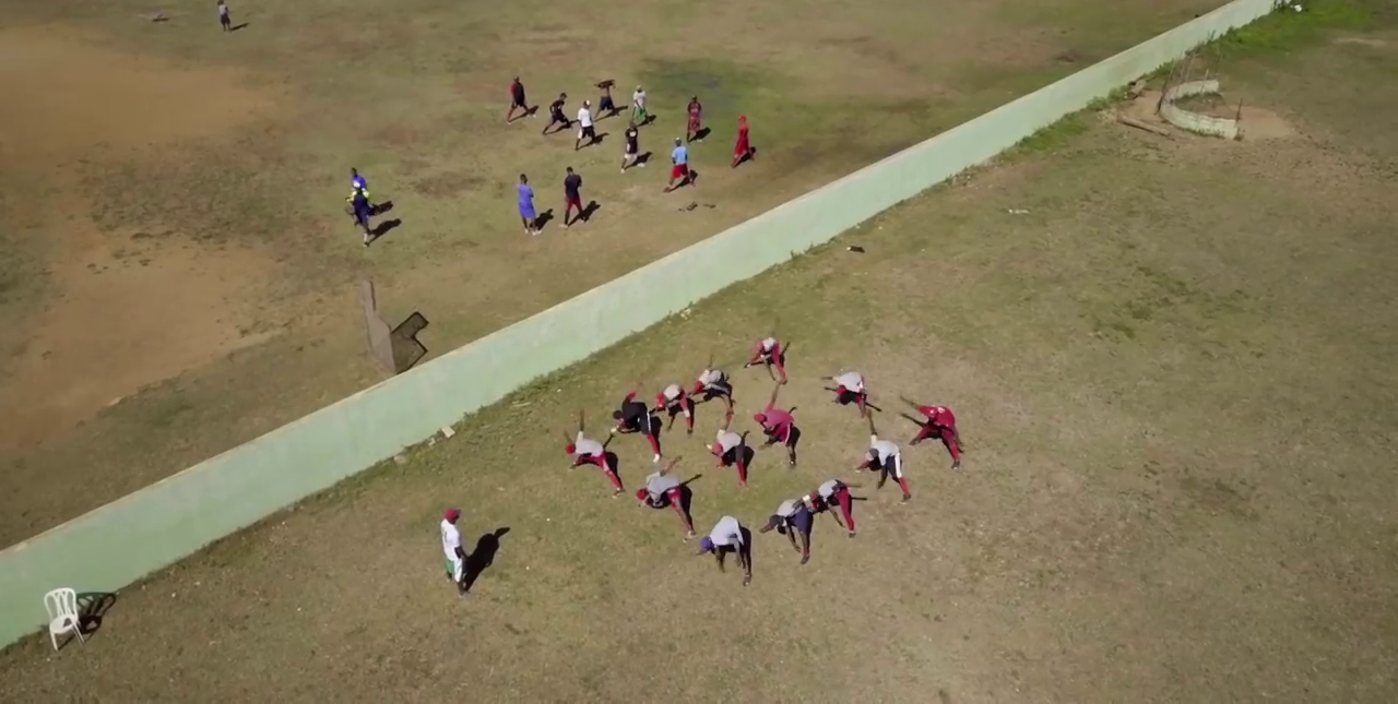 Jóvenes entrenando.